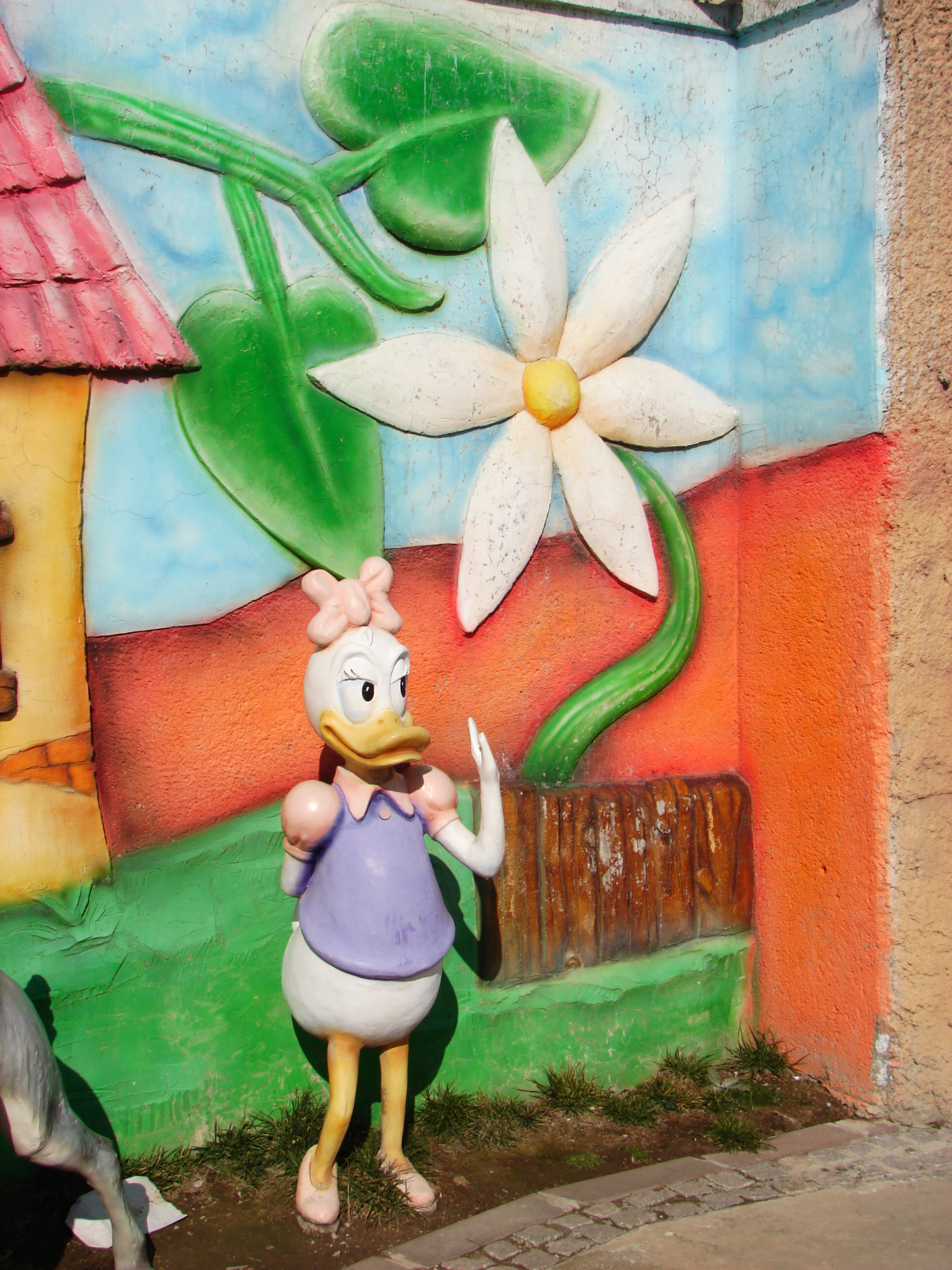 Ankara Amusement Park